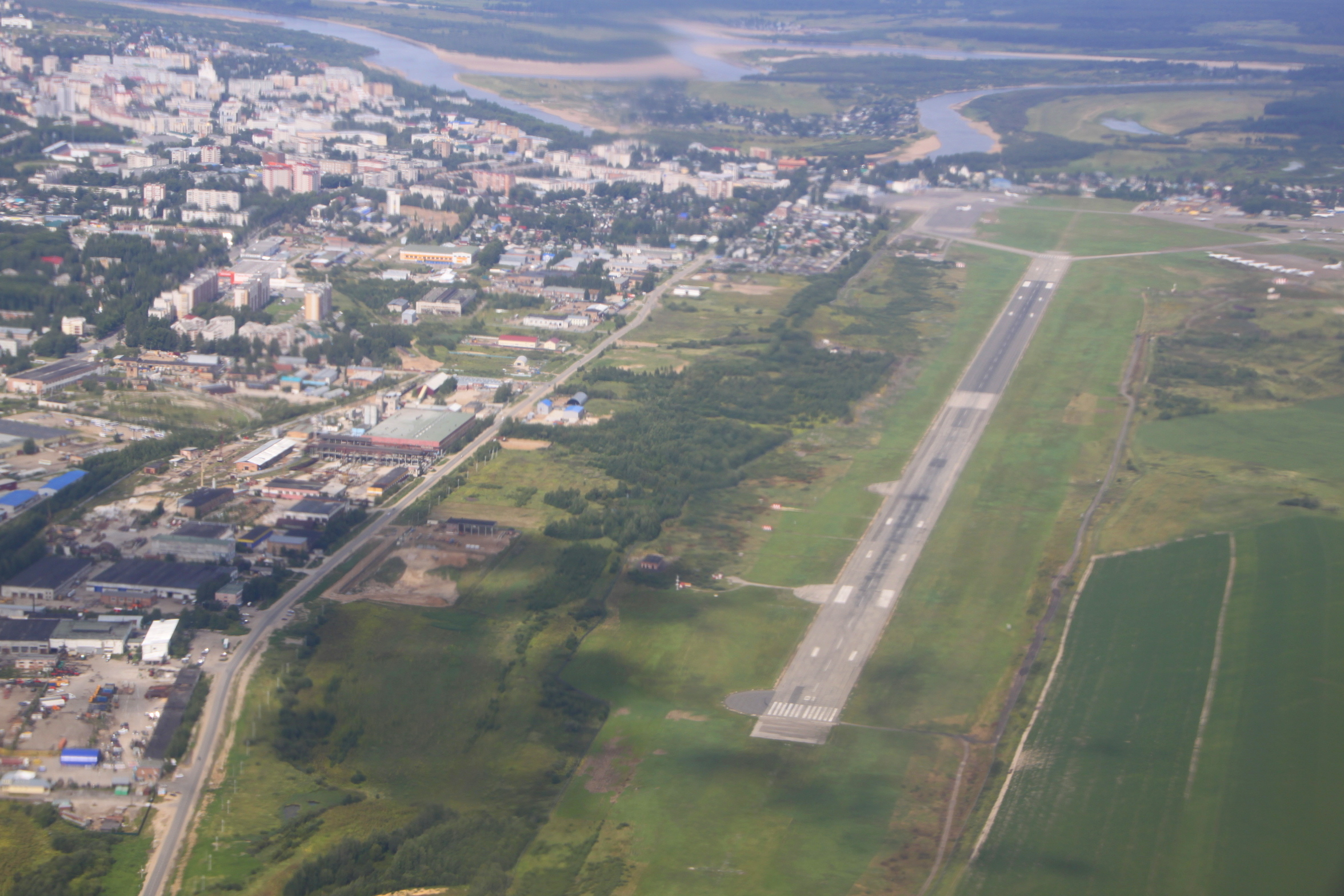 Аэропорт Сыктывкара, вид из самолета